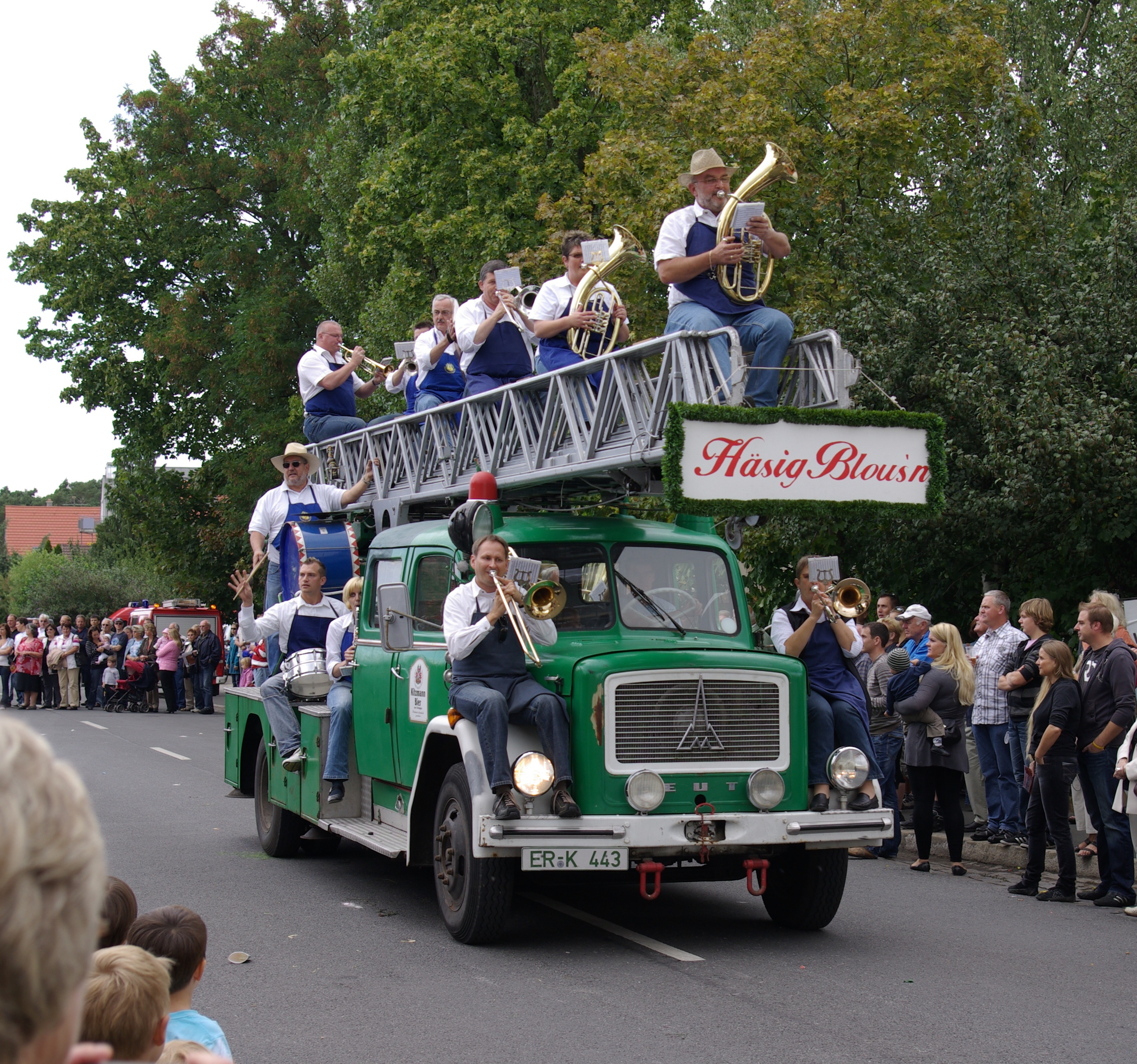 Musikkapelle auf einem historischen Feuerwehrfahrzeug von Magirus-Deutz beim Umzug der Kirchweih in Erlangen-Eltersdorf